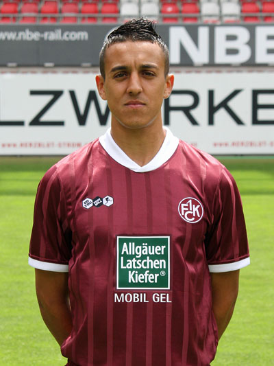 Chadli Amri, Fußballspieler